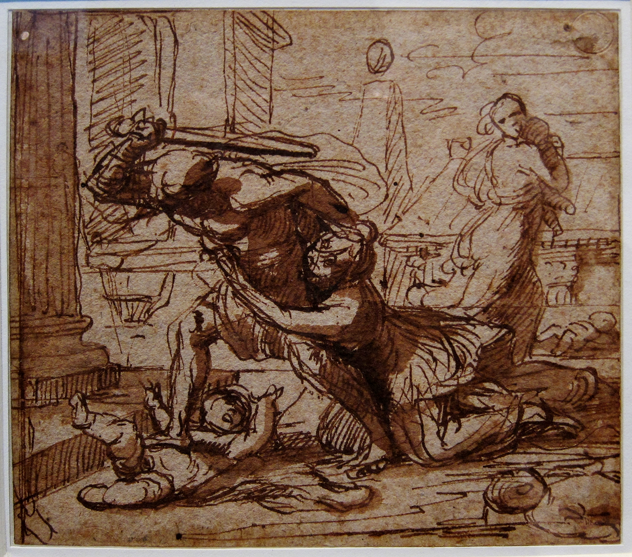 Massacre des innocents au Palais des beaux-arts de Lille.